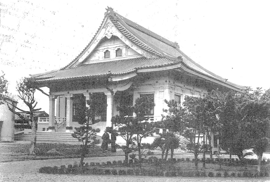 中文（台灣）: 淨土宗台北別院開教院本堂( 今善導寺 )。